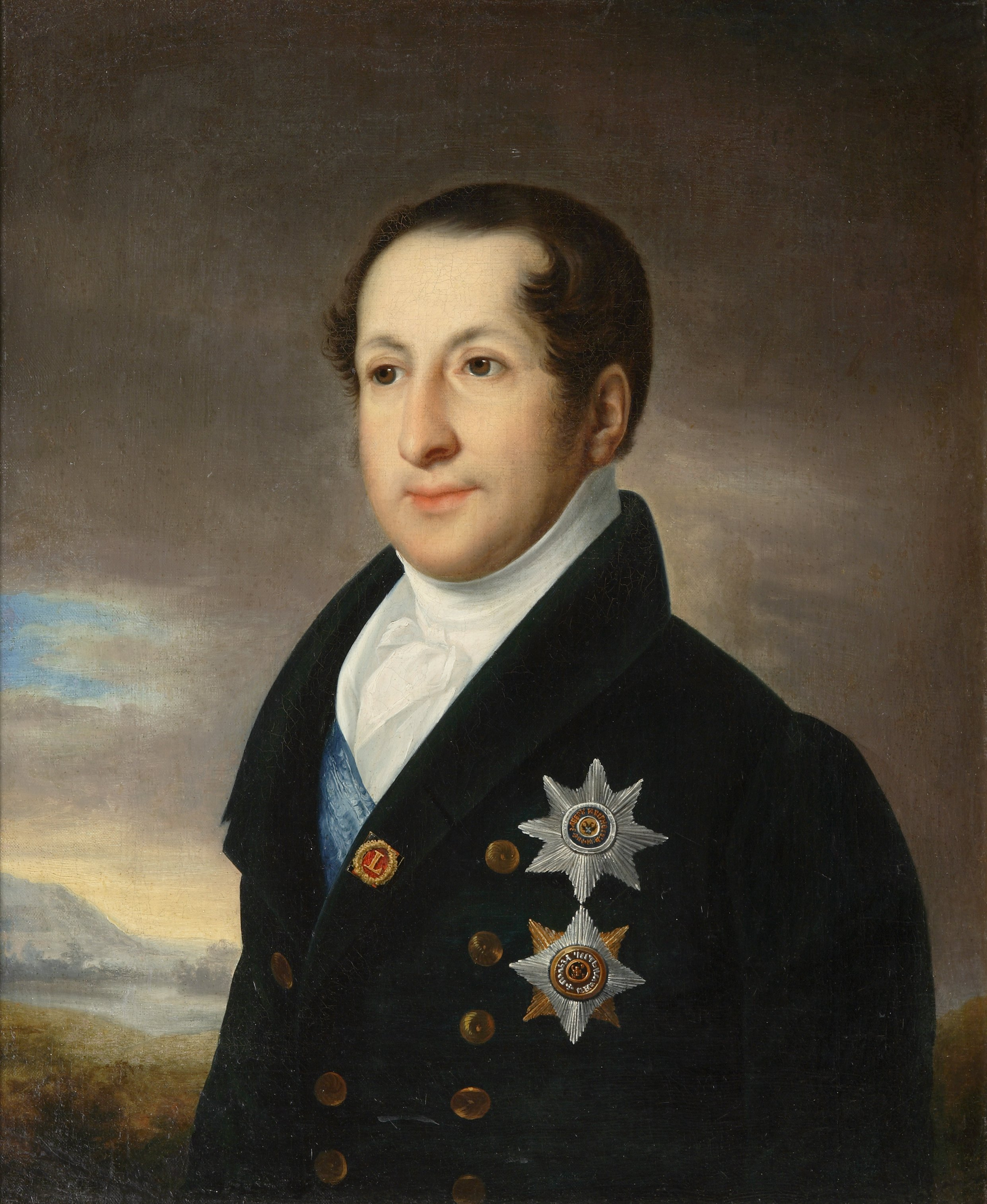 В.А.Тропинин. Портрет князя С.М.Голицына. После 1828 года.